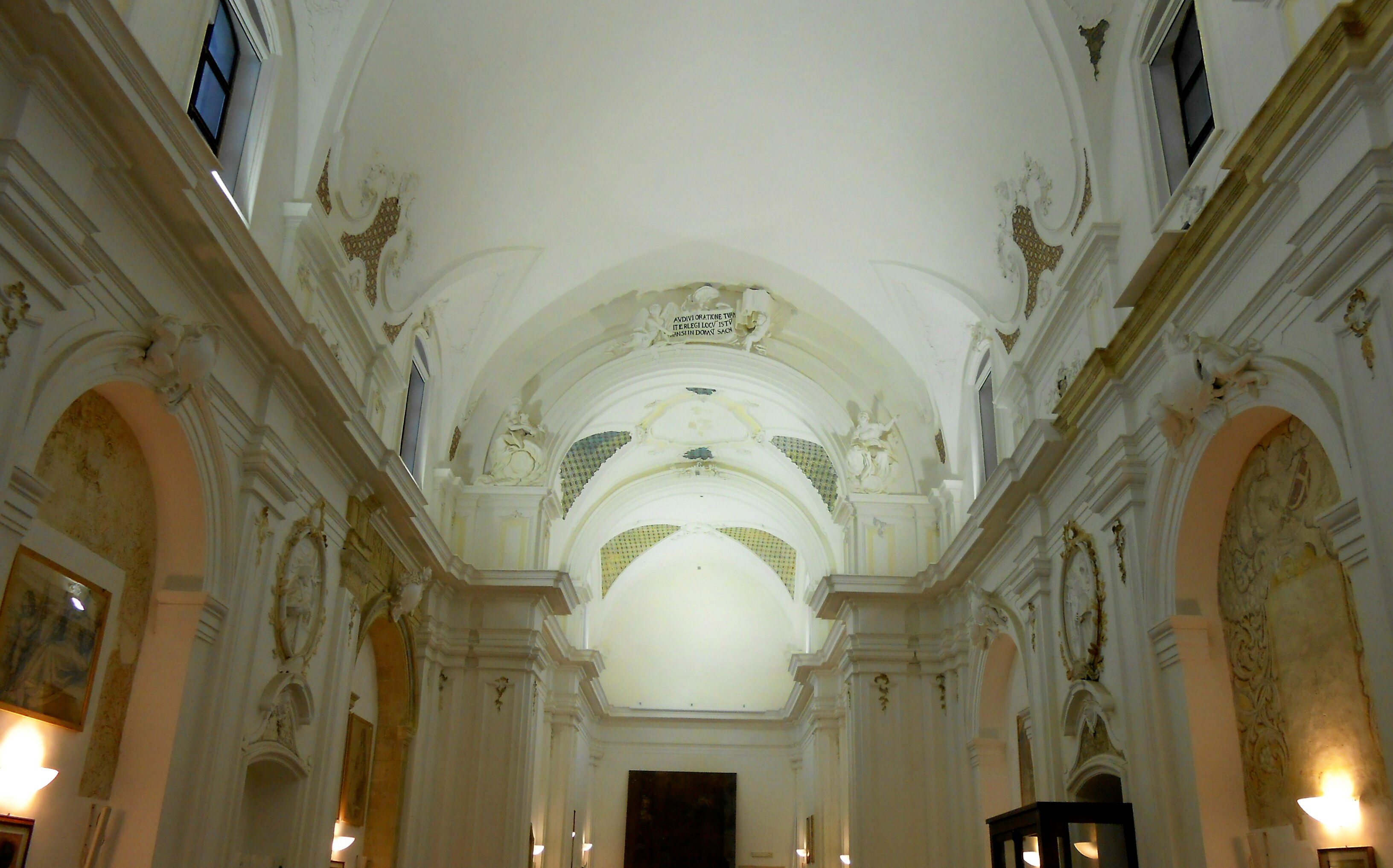 Ex chiesa conventuale di S. Domenico dei frati domenicani, anno 1613. Oggi auditorium comunale.